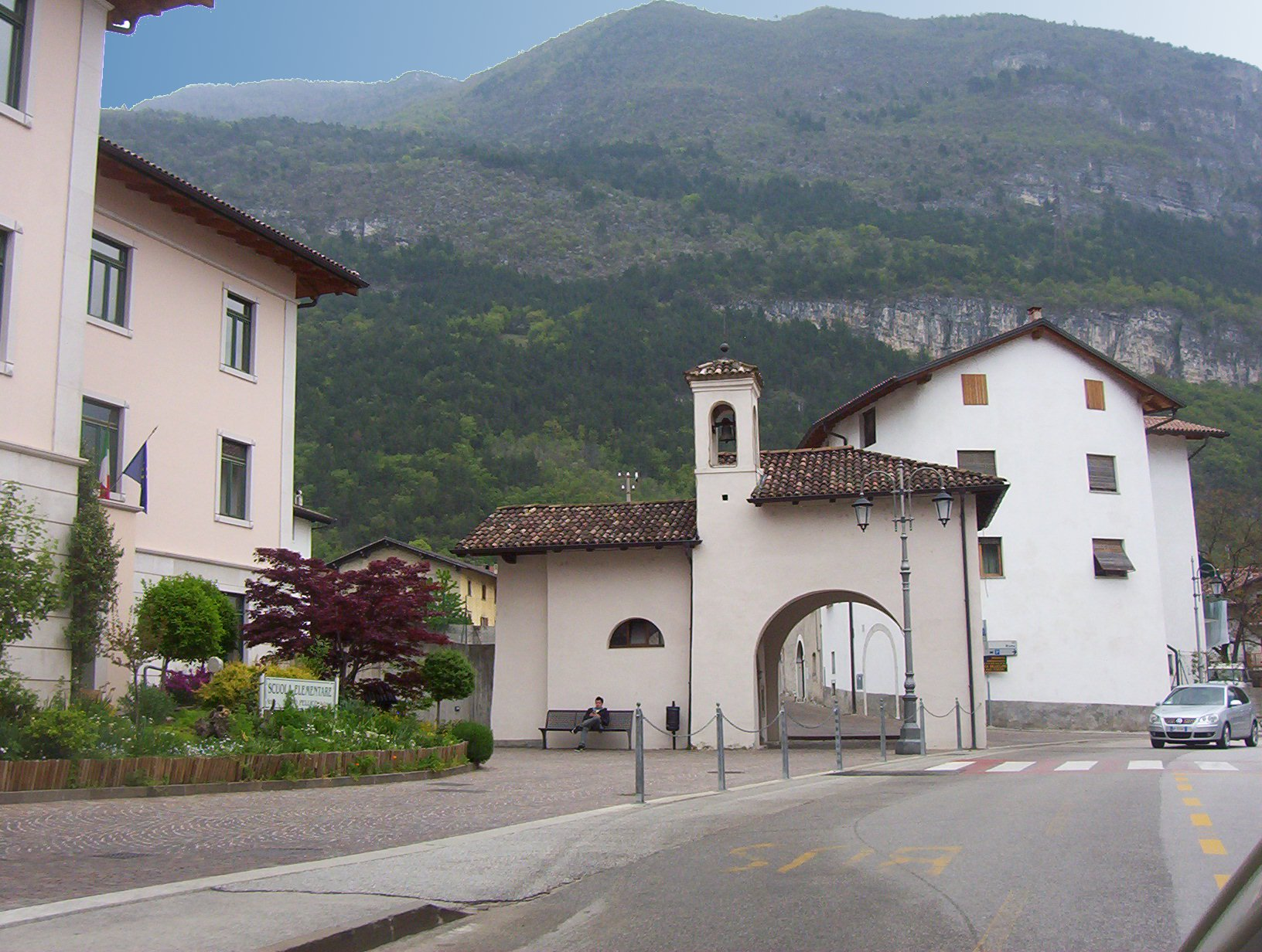 BesenelloTN